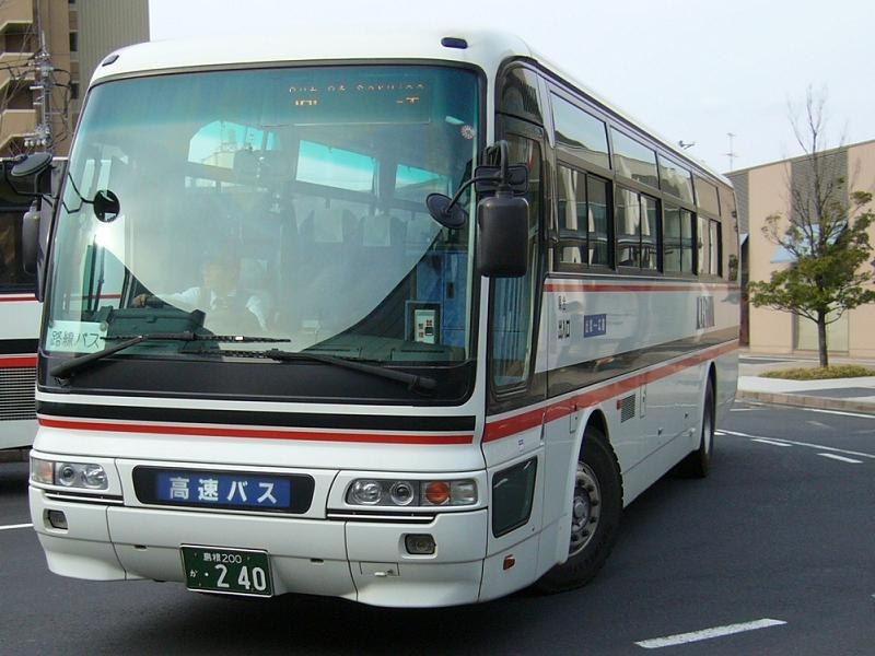 登録番号 島根200か・240 一畑バス出雲営業所所属 みこと号用 2006年3月12日 出雲市駅前にて撮影 撮影者 Tokatsu kokubu